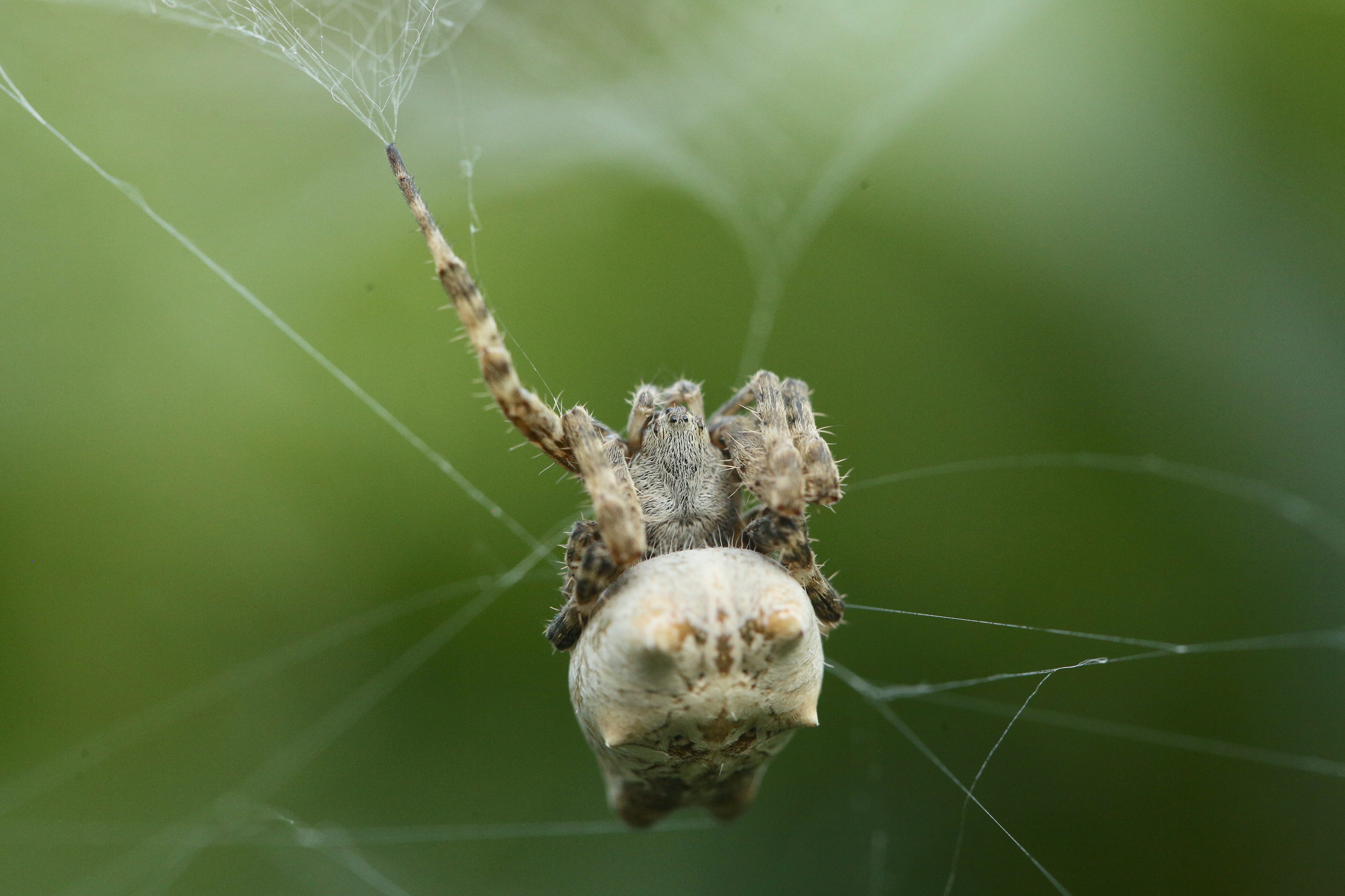 Femelle adulte, Sète (Hérault, Occitanie), 04 août 2019